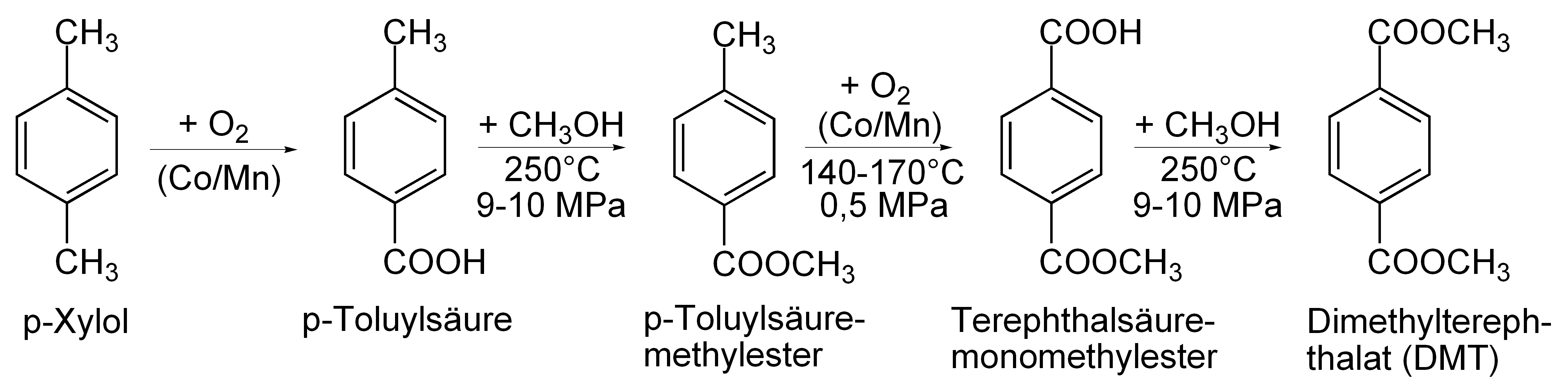 Syntheseweg für DMT nach dem Witten-Imhausen-Verfahren